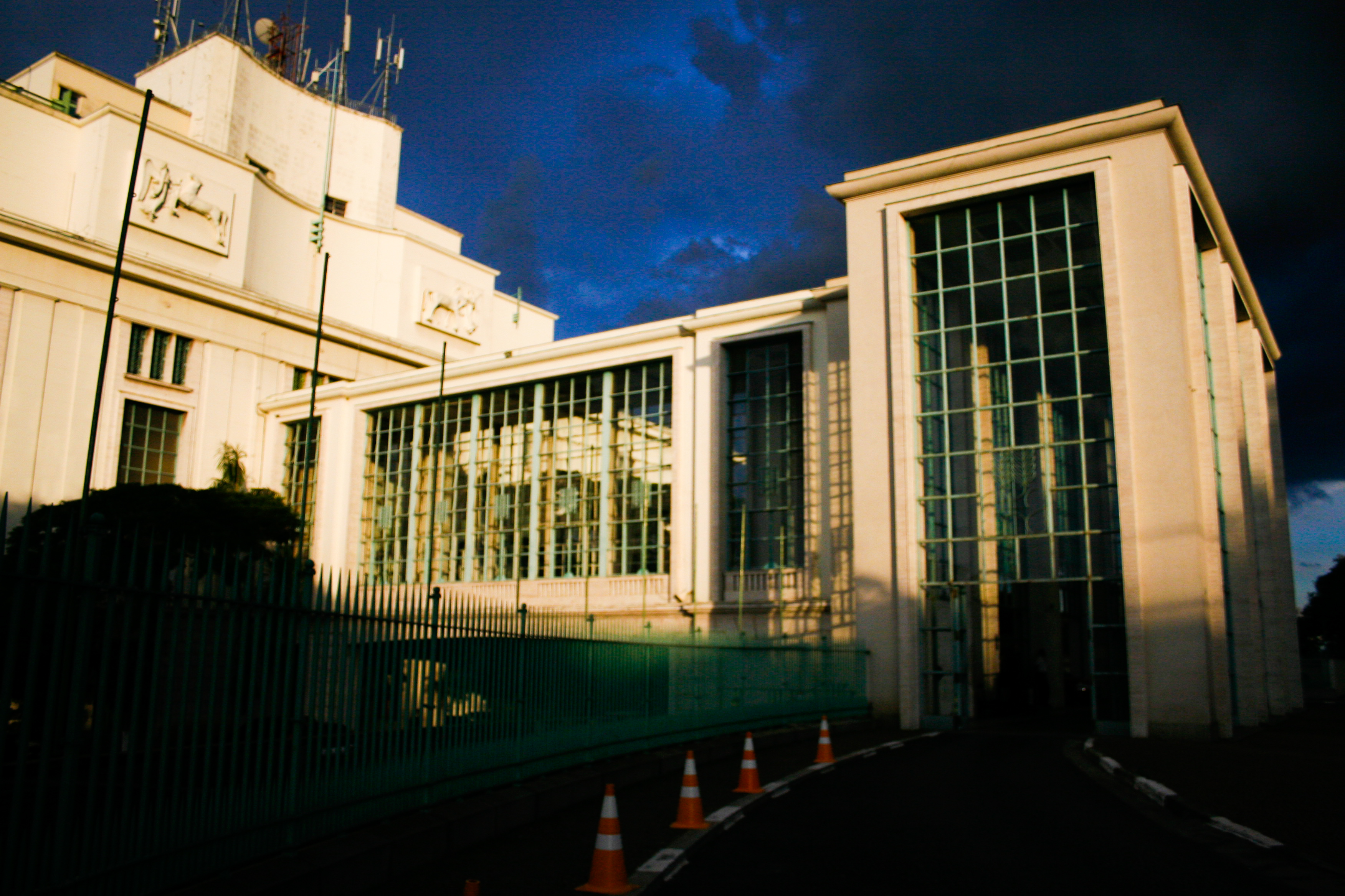 Avenida Lineu de Paula Machado, 1263, Cidade Jardim. Foto por André Deak para o Arte Fora do Museu (